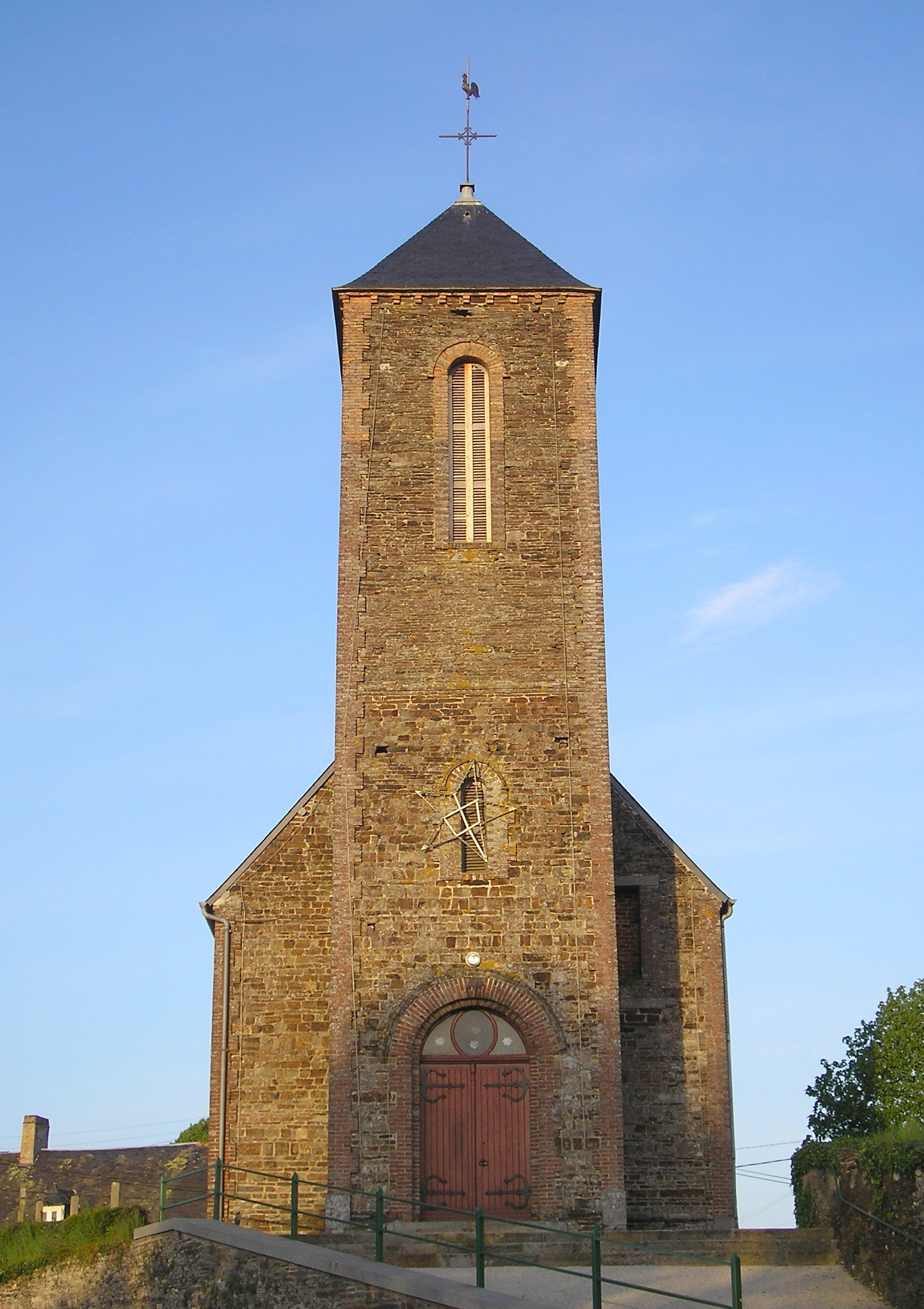 Le Mesnil-Villement (Normandie, France). L'église Saint-Martin.